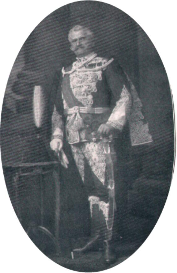 Royal Hungarian Life Guards